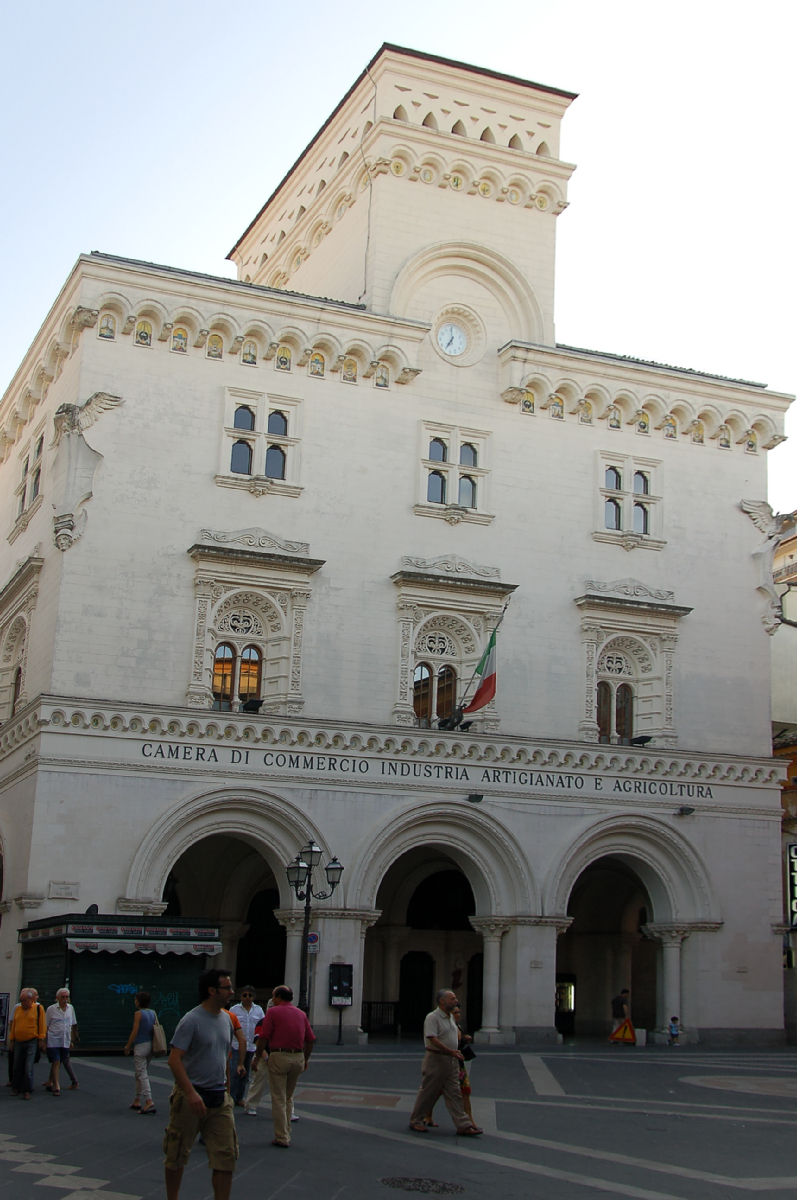 Chieti City 2011